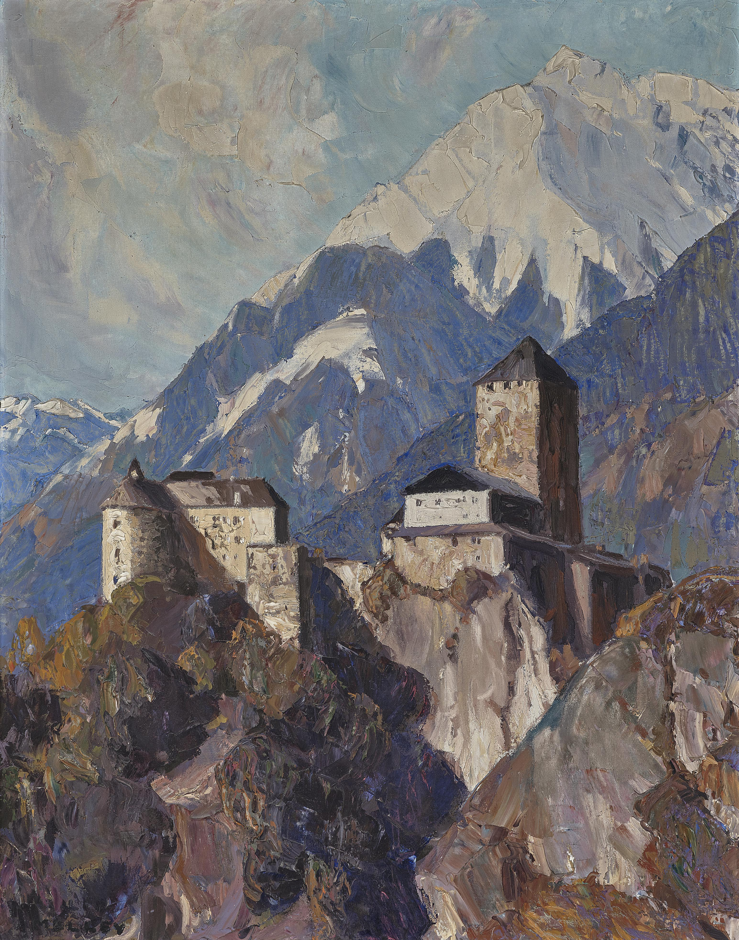 Oskar Mulley Schloss Tirol 1927